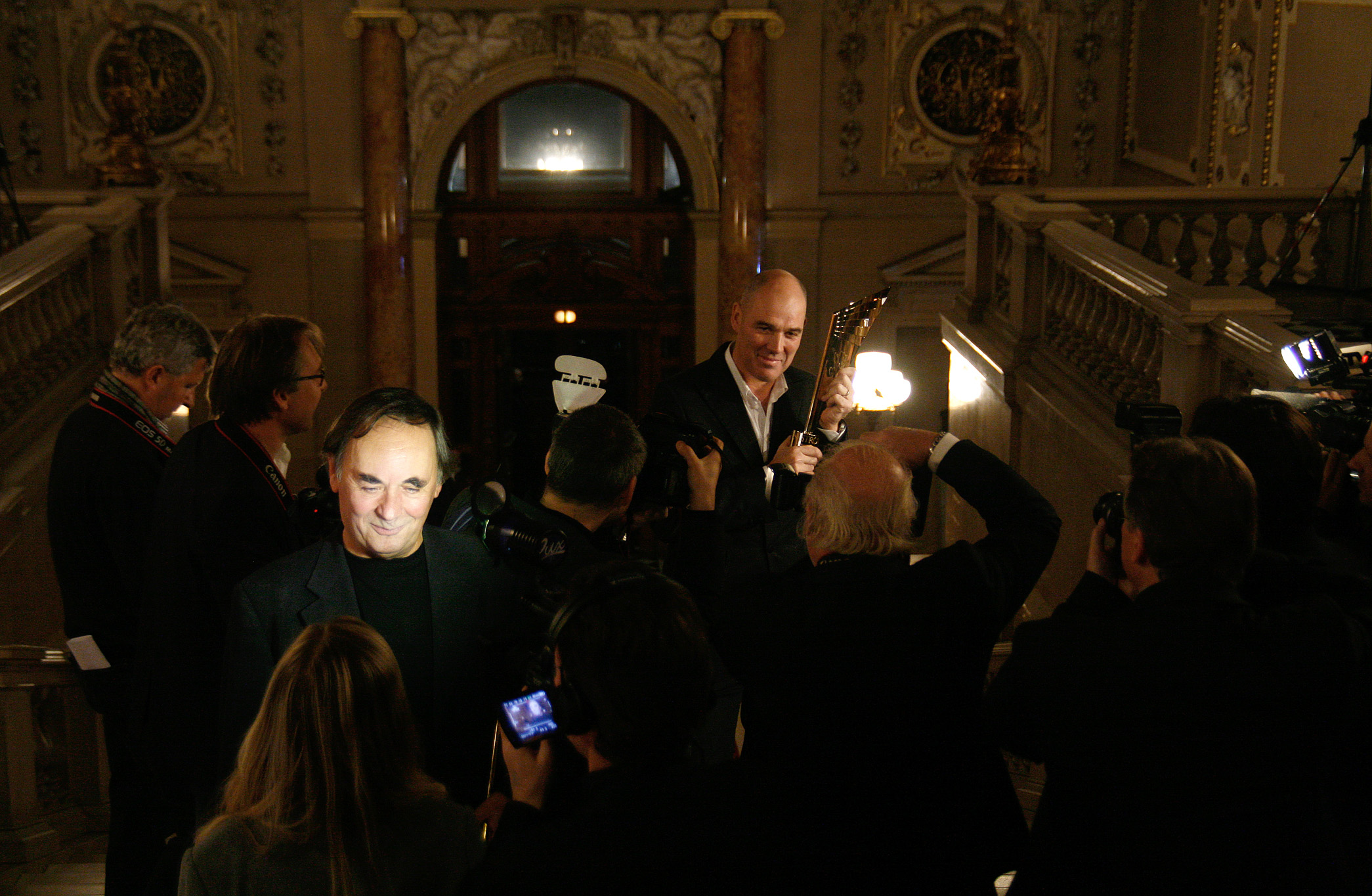 Johann Adam Oest, ausgezeichnet als bester Nebendarsteller, und Matthias Hartmann, ausgezeichnet mit dem Spezialpreis, bei der Verleihung des Nestroy-Theaterpreises 2010 im Burgtheater in Wien.